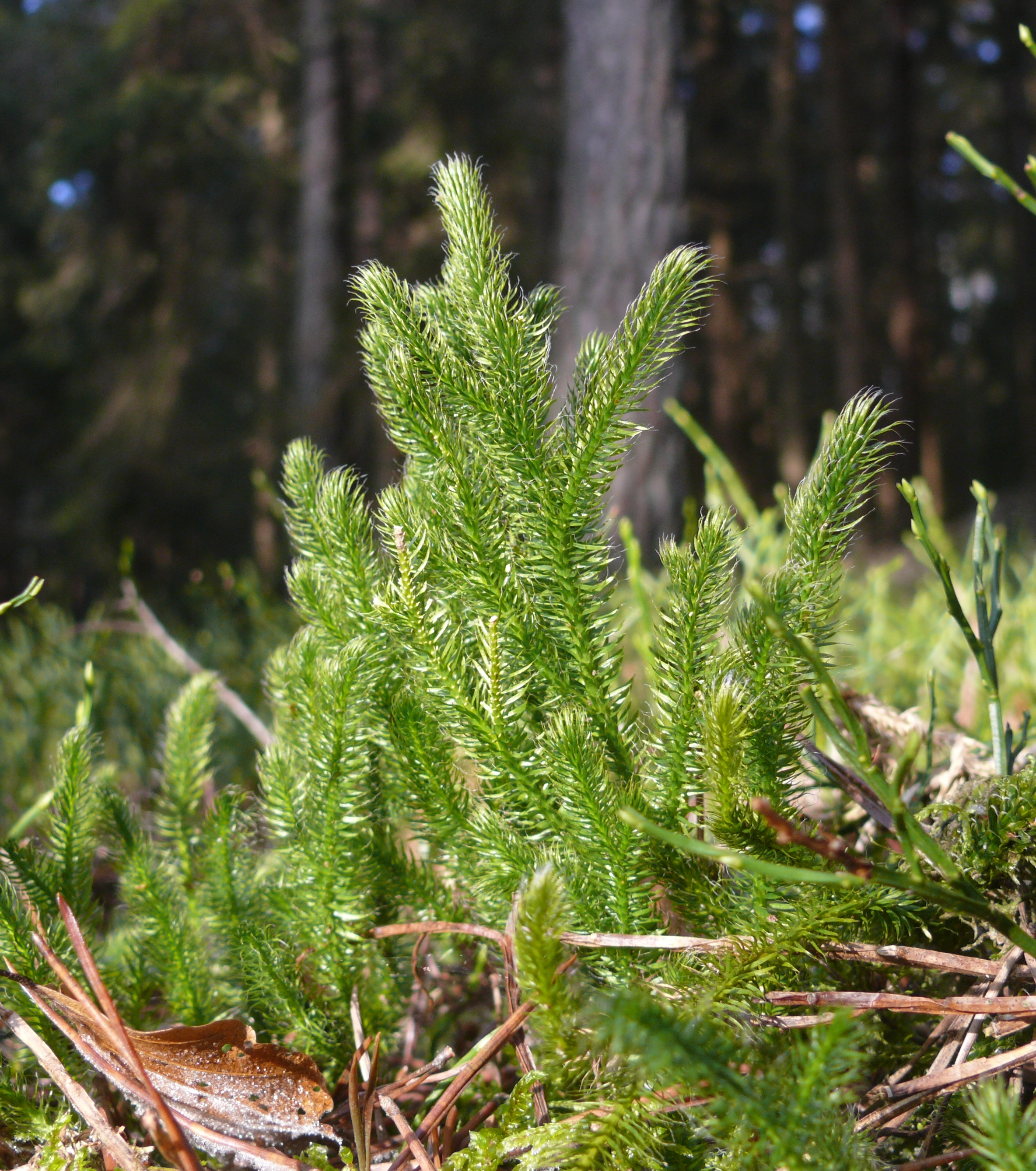 Lycopodium clavatum, Schwäbisch-Fränkische Waldberge, Germany